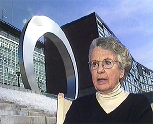 Portrait de Marta Pan